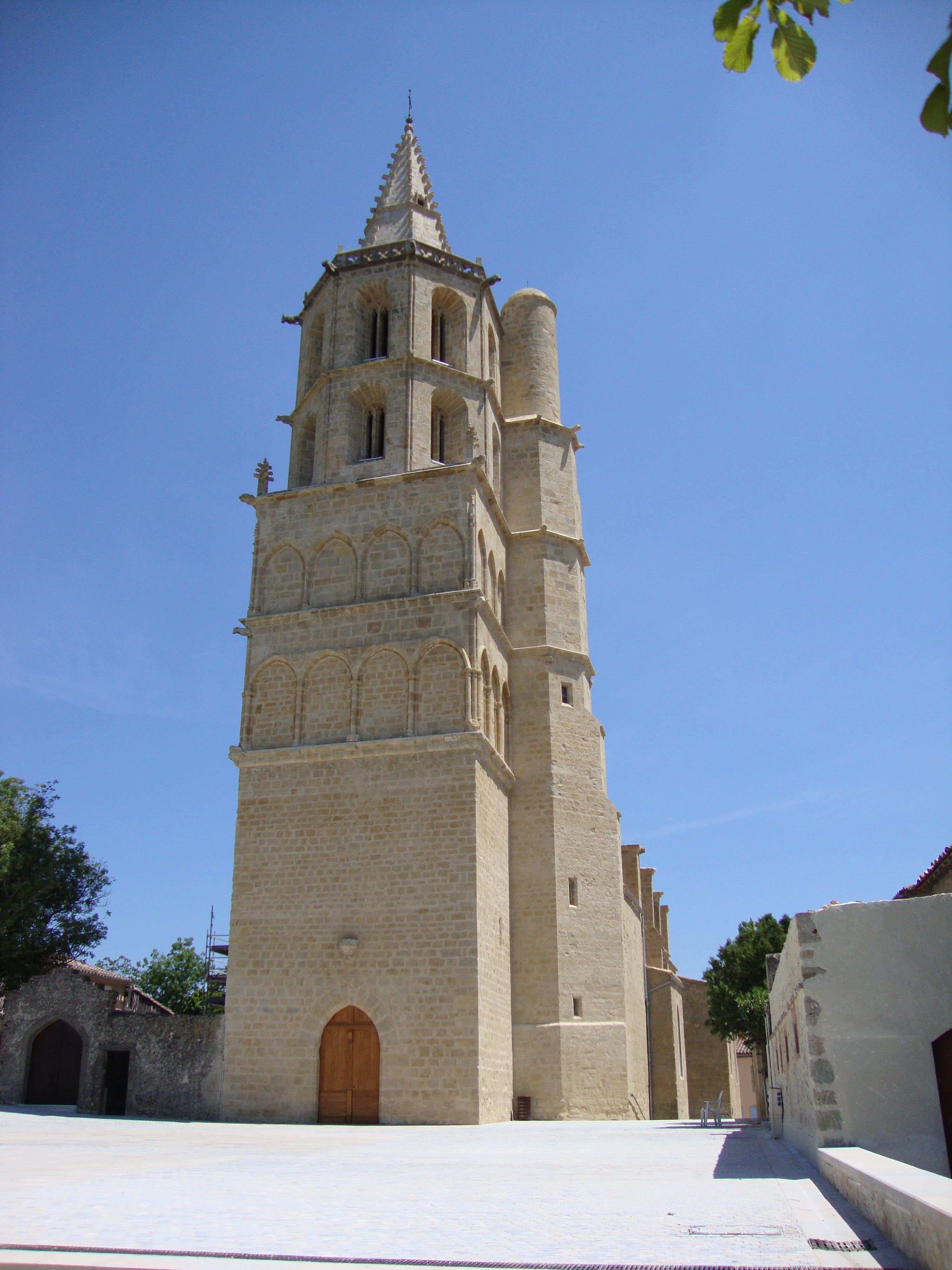 Avignonet-Lauragais (Haute-Garonne, Fr) église, tour et façade